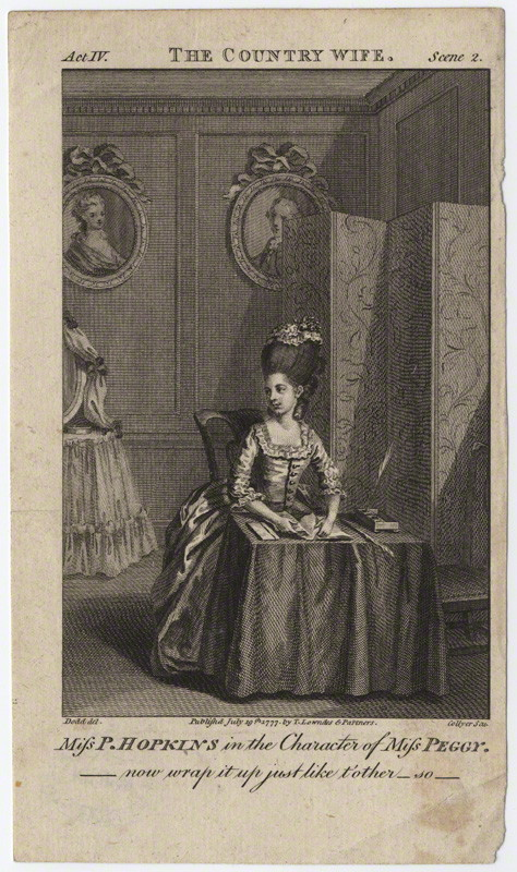 Priscilla Kemble